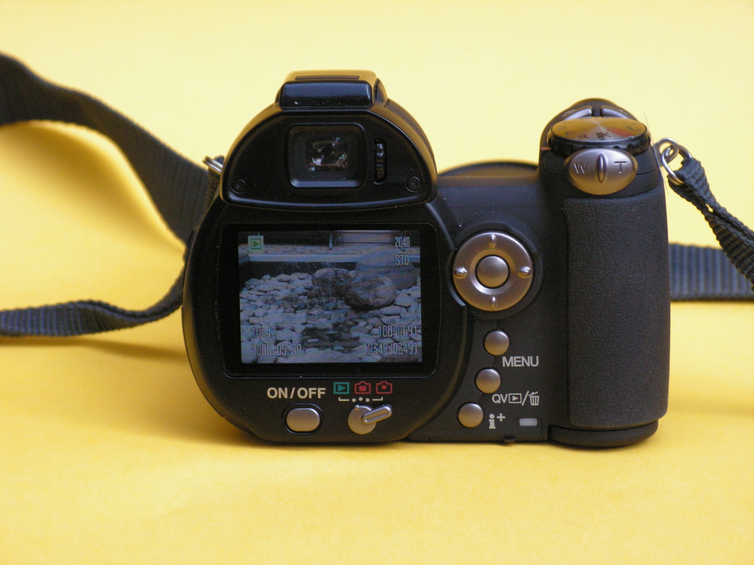 Foto Stefan Lnder